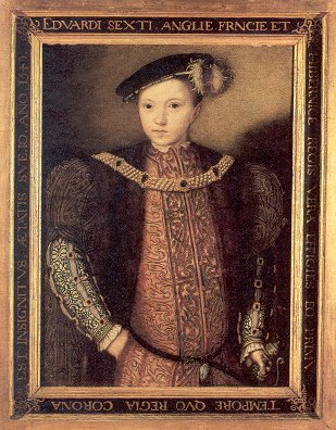 Edward VI